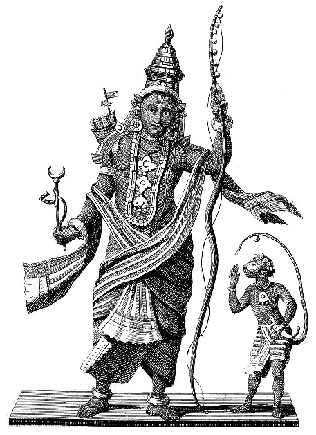 Gravure représentant Râma par P. Sonnerat / Gallica